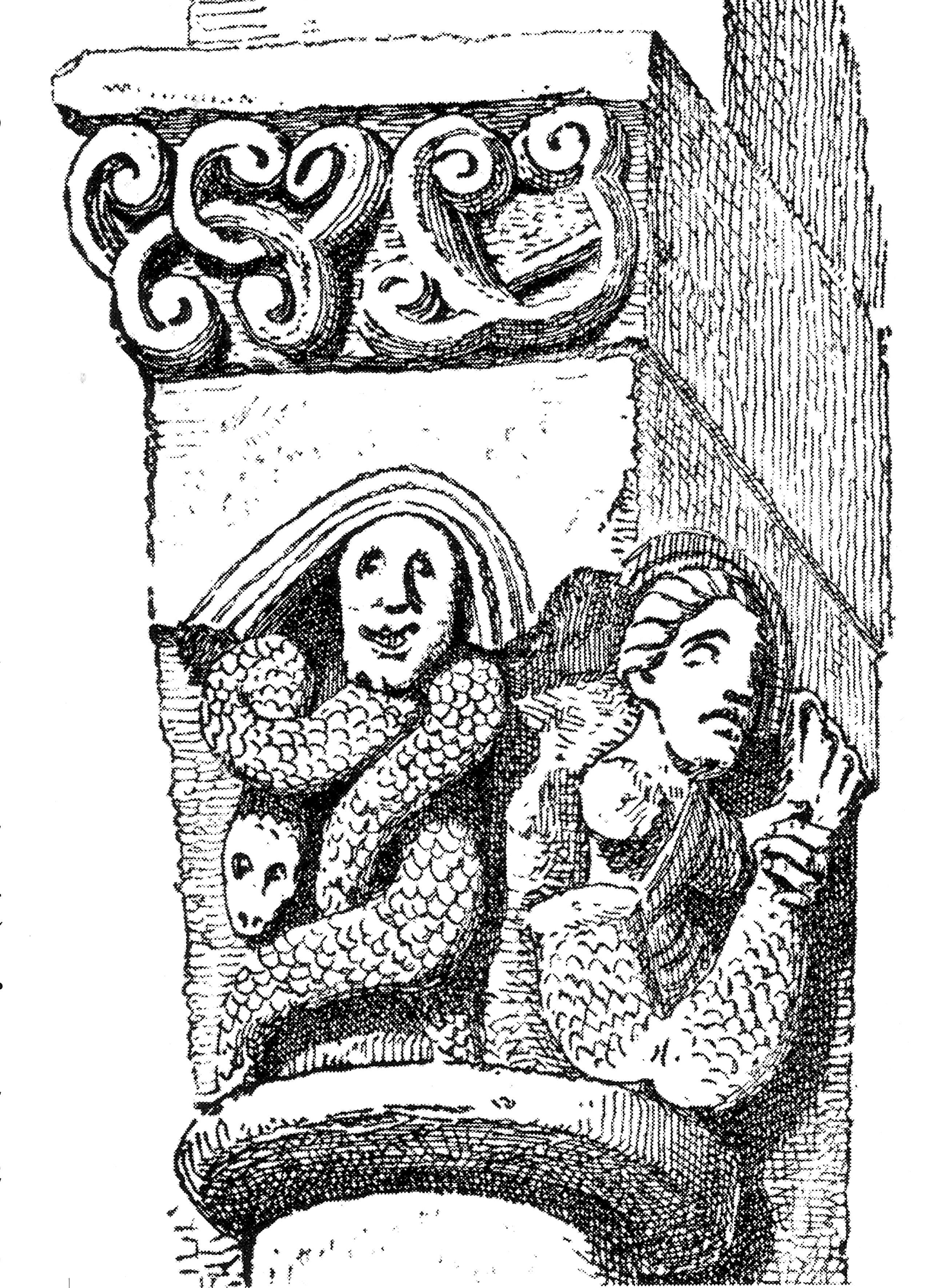 Église Saint-Vivien de Romagne